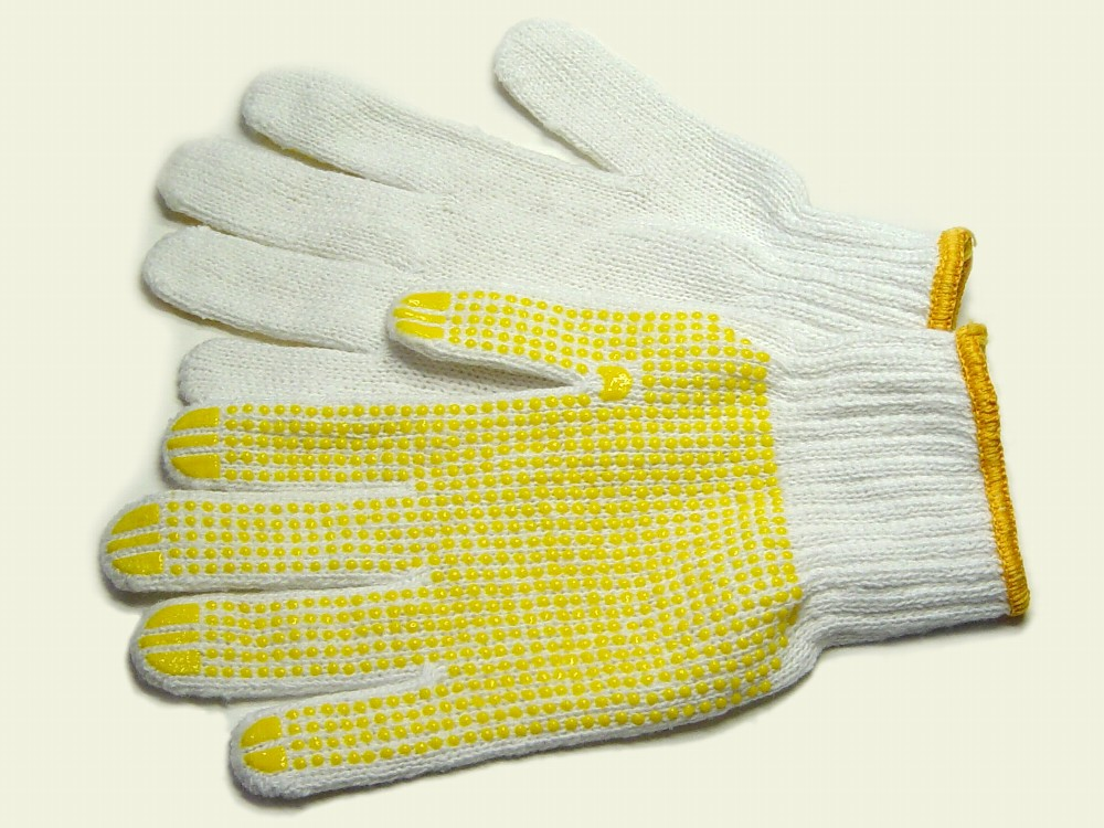 Gunte (軍手)